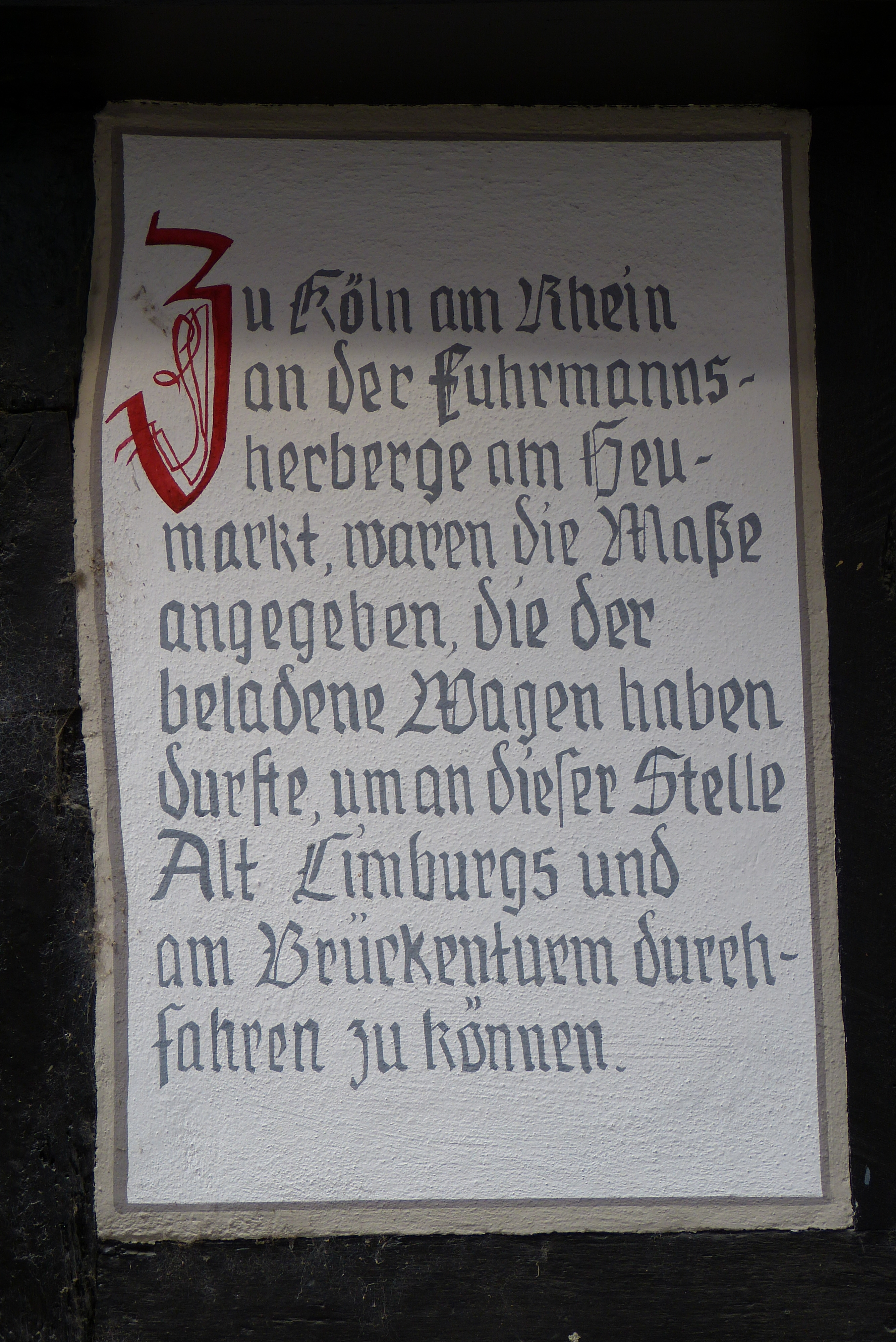 Limburg an der Lahn, Kleine Rütsche 4, Hinweistafel Handelsstraße Köln-Frankfurt